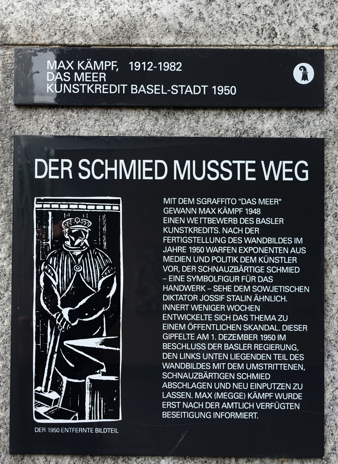 Max Kämpf (1912–1982) Maler und Zeichner. Sgraffito, Das Meer. 1948–1950, an der Fassade des Wirtschaftsgymnasium-Schule in Basel. Auf dem Bildnis war zusätzlich ein Schmied (Allegorie auf das Handwerk) dargestellt (angeblich Stalin gleichend), dieser wurde jedoch nach der sogenannten «Schnauzaffäre» und nach der Weigerung einer Überarbeitung des entsprechenden Details über Nacht weggemeisselt.